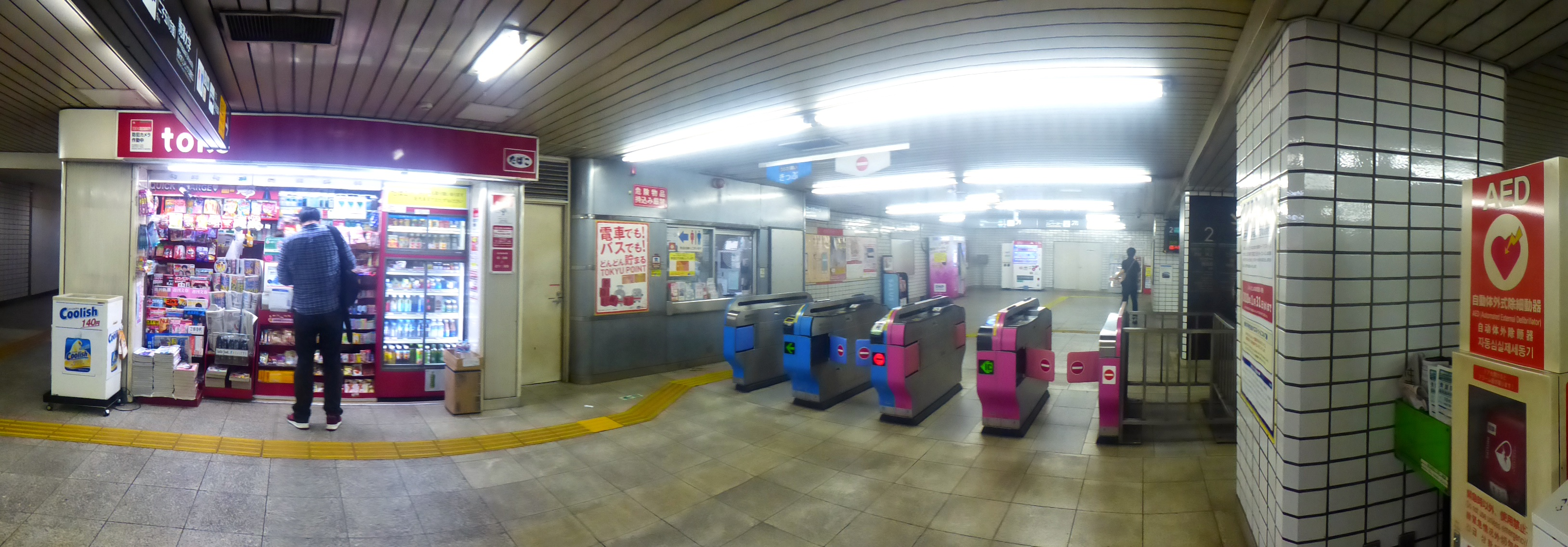 Komazawa-daigaku Station ticket gates (駒沢大学駅の改札)